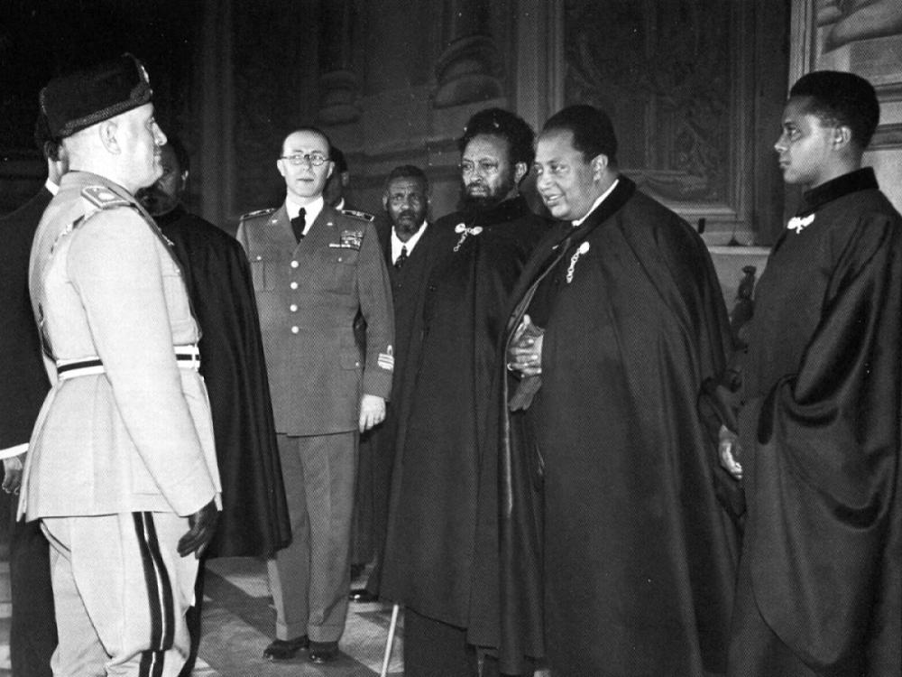 I capi abissini ras Sejum Mangascià, ras Ghetacciù Abaté e ras Kebbedé Guebret ricevuti a Roma da Benito Mussolini il 6 febbraio 1937, prestano atto di obbedienza dopo l'annessione dell'Abissinia all'impero. Li accompagna il Colonnello Carmine Starace.